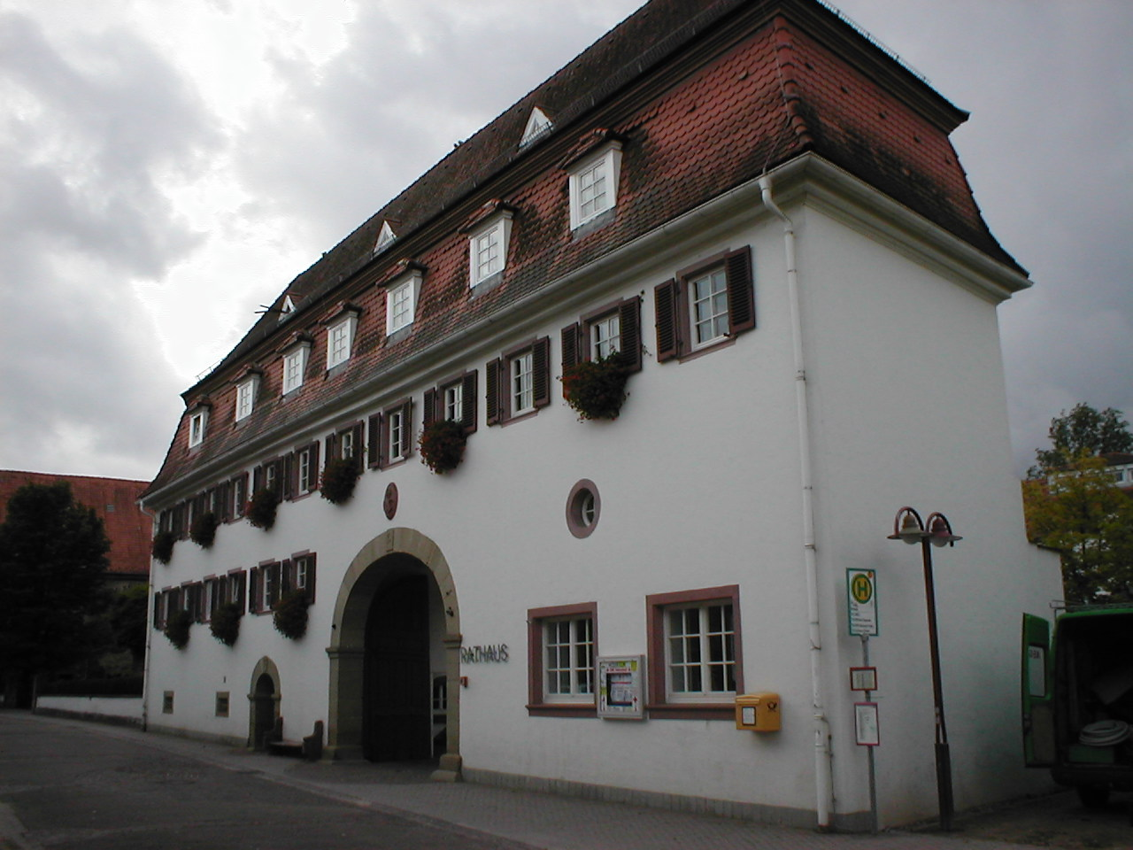 Neues rathaus in Helmstadt